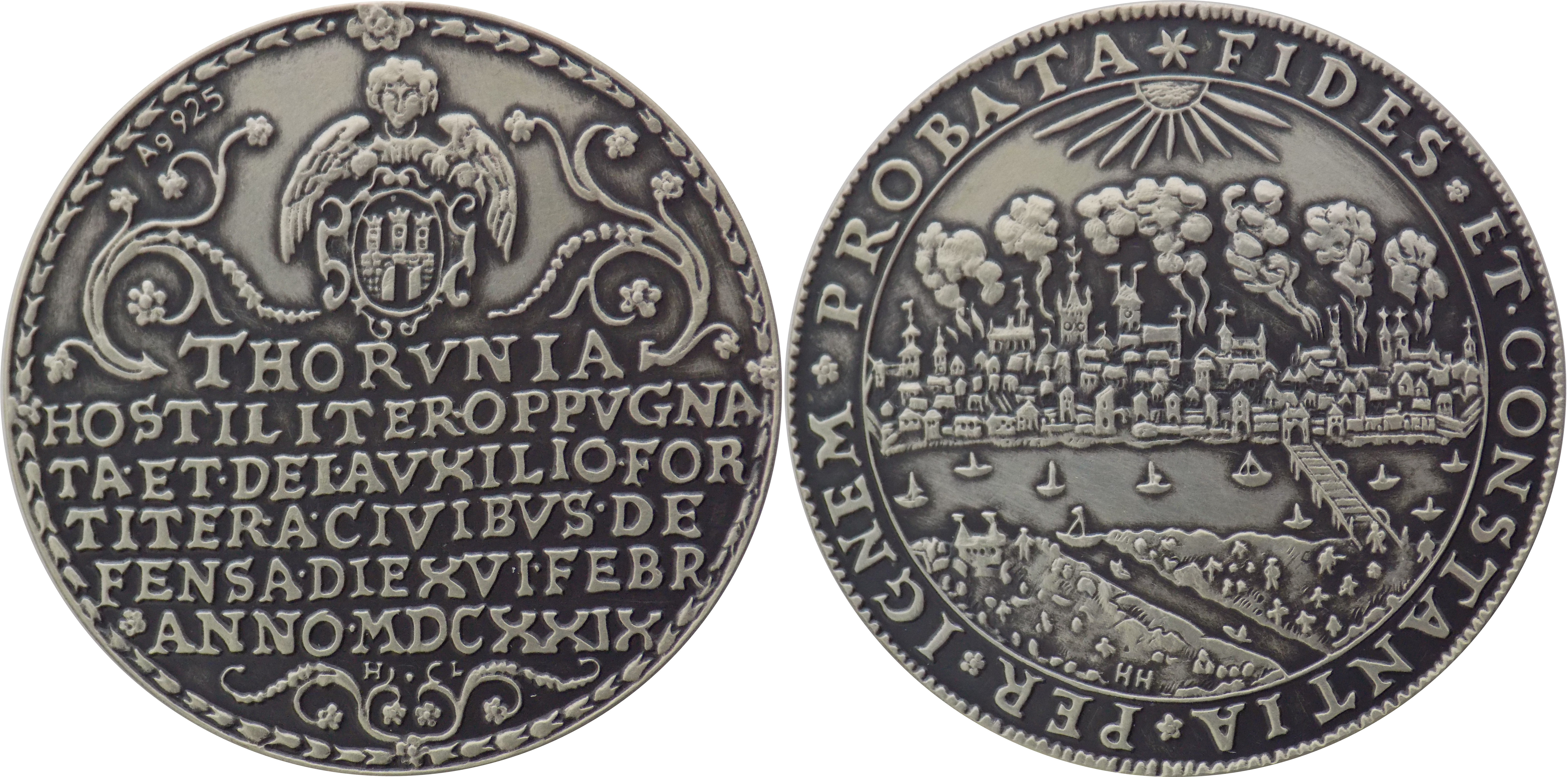 Replika talara pamiątkowego miejskiego Toruń 1629